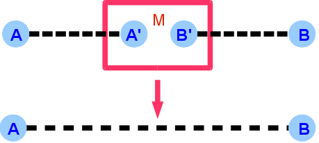 Einfache Skizze, um das Prinzip des entanglement swapping zu illustrieren: die Systeme A und A' sowie B und B' werden in einem verschränkten Zustand präpariert. Durch eine geeignete gemeinsame Messung (Bell-Messung) der Systeme A' und B' wird der Zustand der Systeme A und B in einen verschränkten Zustand transformiert. In der Regel ist der Endzustand weniger verschränkt als di eAnfangszustände. Damit er nicht separabel ist, müssen die Anfangszustände hinreichend stark verschränkt sein und die Messung hinreichend genau.